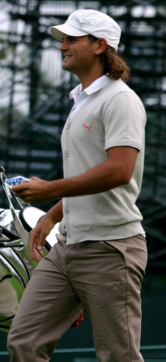 Johan Edfors, U.S. Open 2008